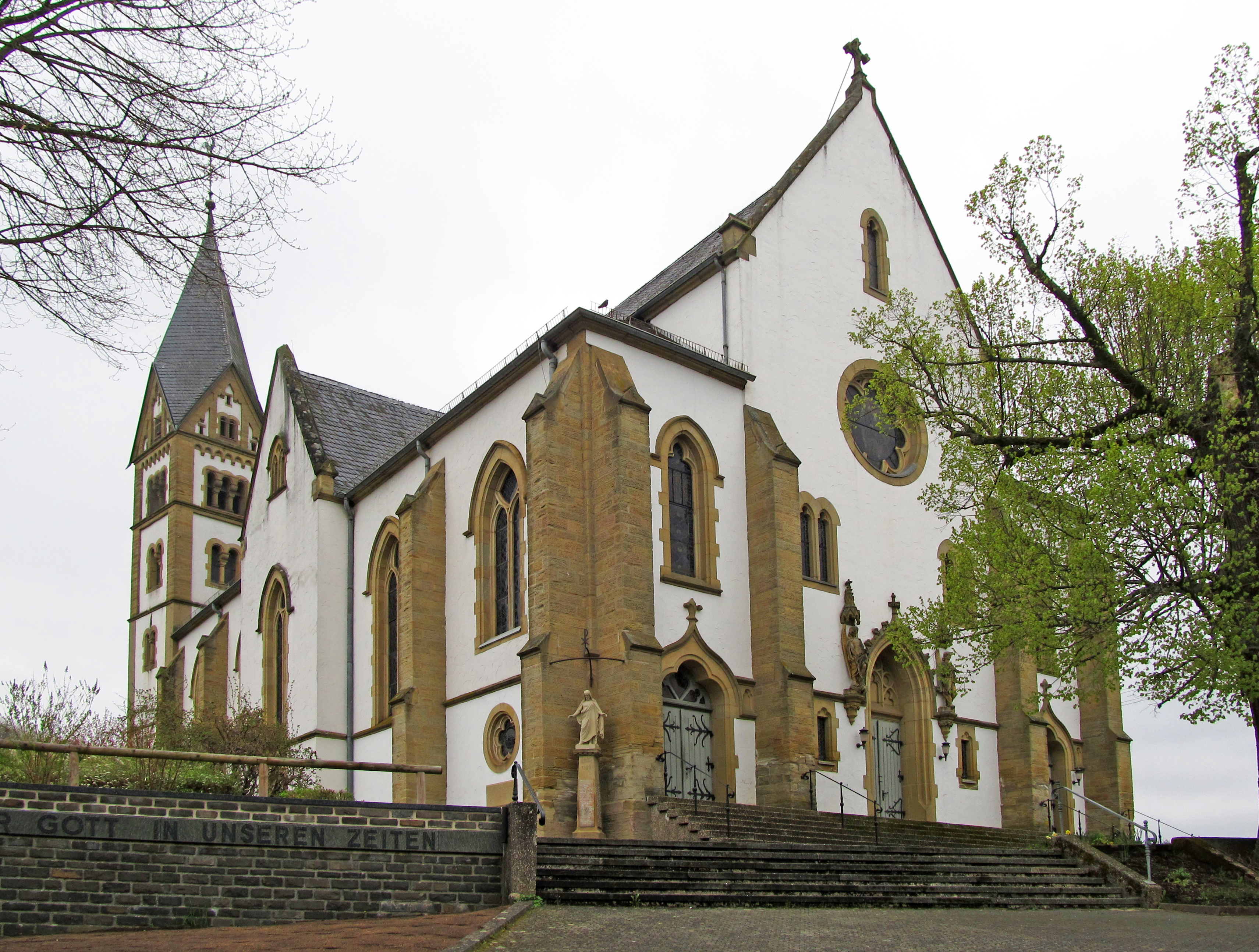 Die katholische Pfarrkirche Mariä Himmelfahrt in Marpingen, Landkreis St. Wendel, Saarland